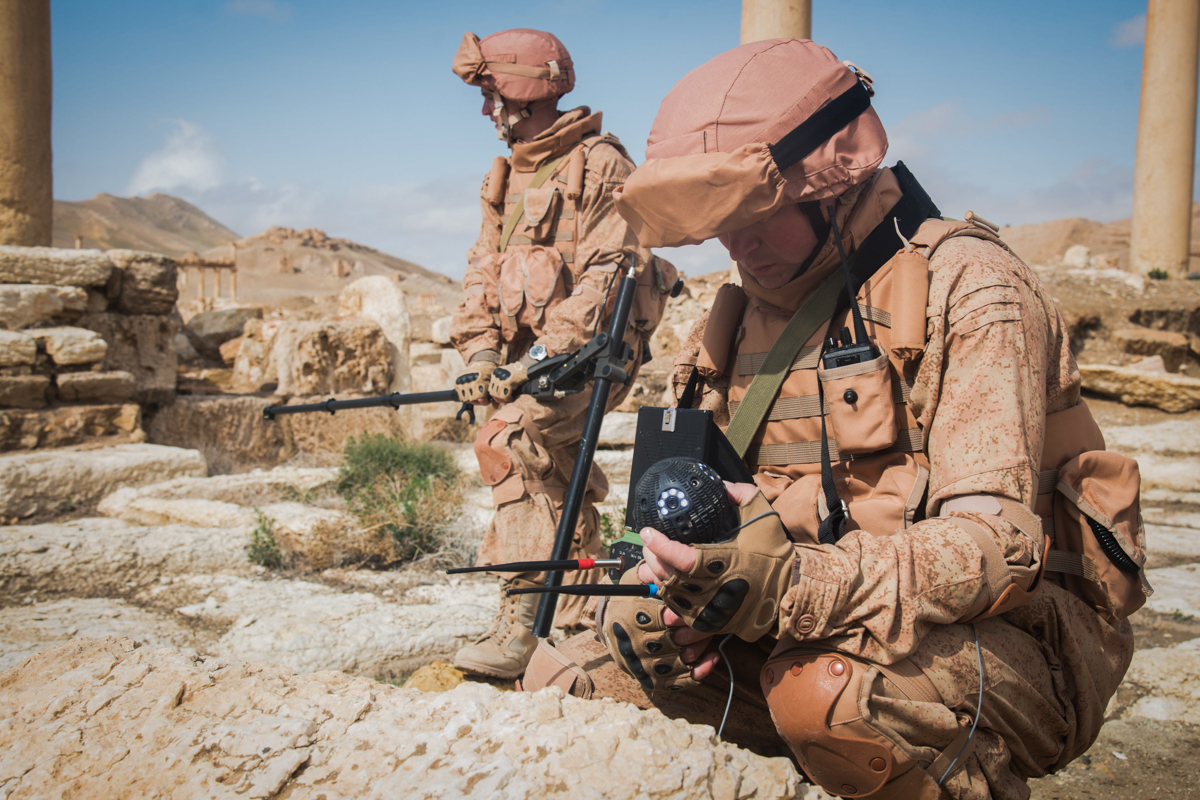 Использование военными инженерами МПЦ ВС РФ новейших инженерных средств при разминировании Пальмиры.